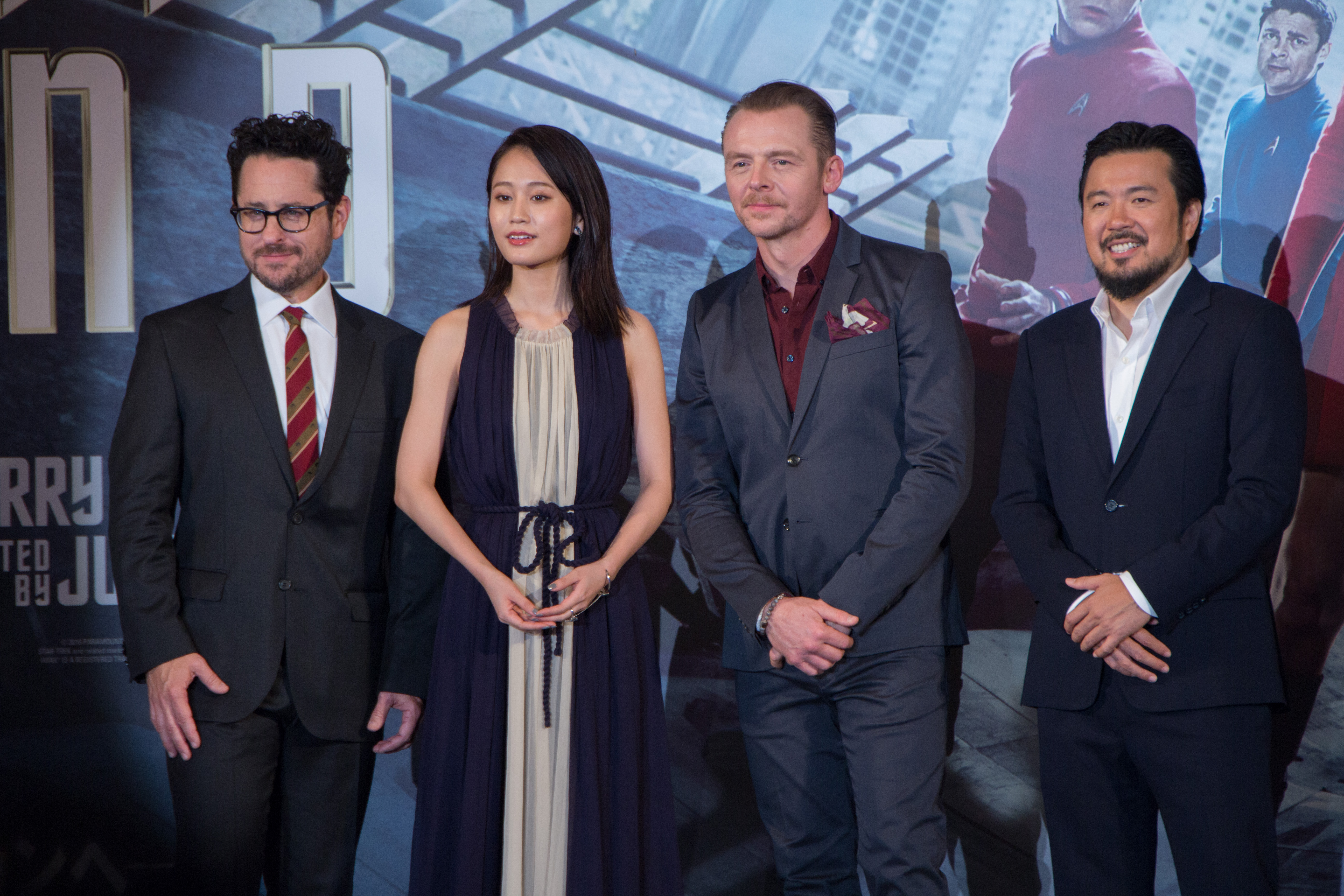 スター・トレック BEYOND ジャパン・プレミア レッドカーペット J・J・エイブラムス サイモン・ペッグ ジャスティン・リン 前田敦子